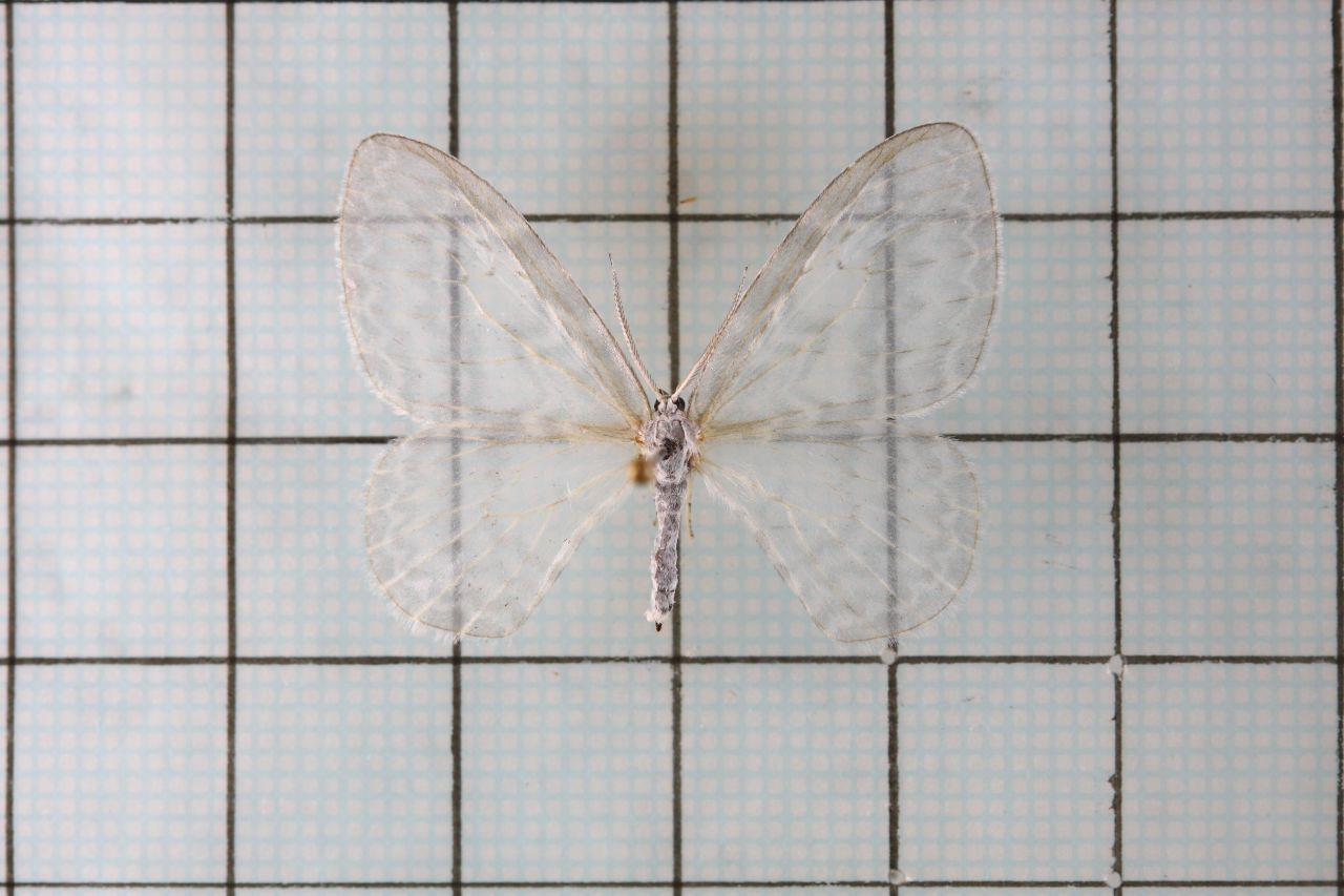 Deroca hidda ampla Inoue 1988 紗鉤蛾 鞍2:P.32,Pl.38-8 台灣蛾類圖說1:P.126